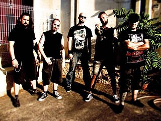 Componentes de Sonitum Shelter